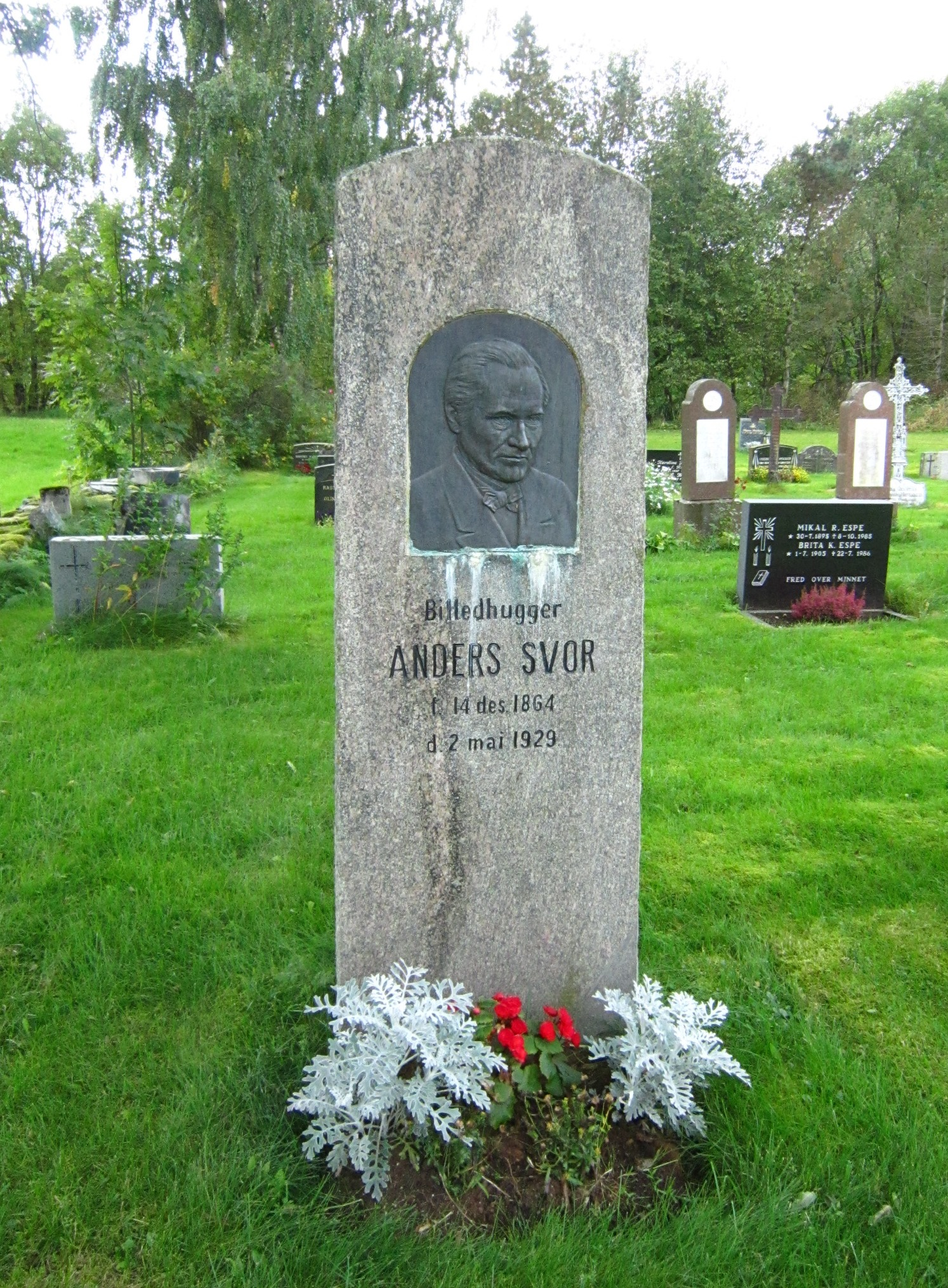 Gravmonument over billedhuggeren Anders Svor ved Hornindal kirke